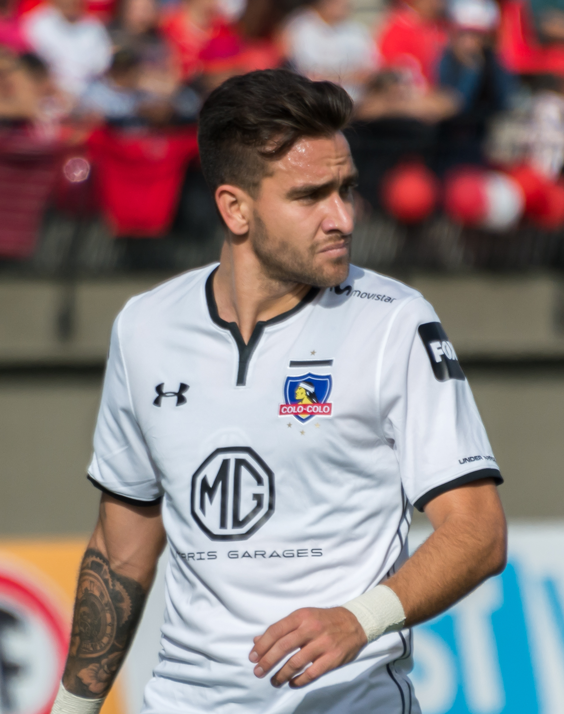 Matías Zaldivia, Unión La Calera v Colo-Colo, Estadio Municipal Nicolás Chahúan Nazar, La Calera, Región de Valparaíso, Chile.